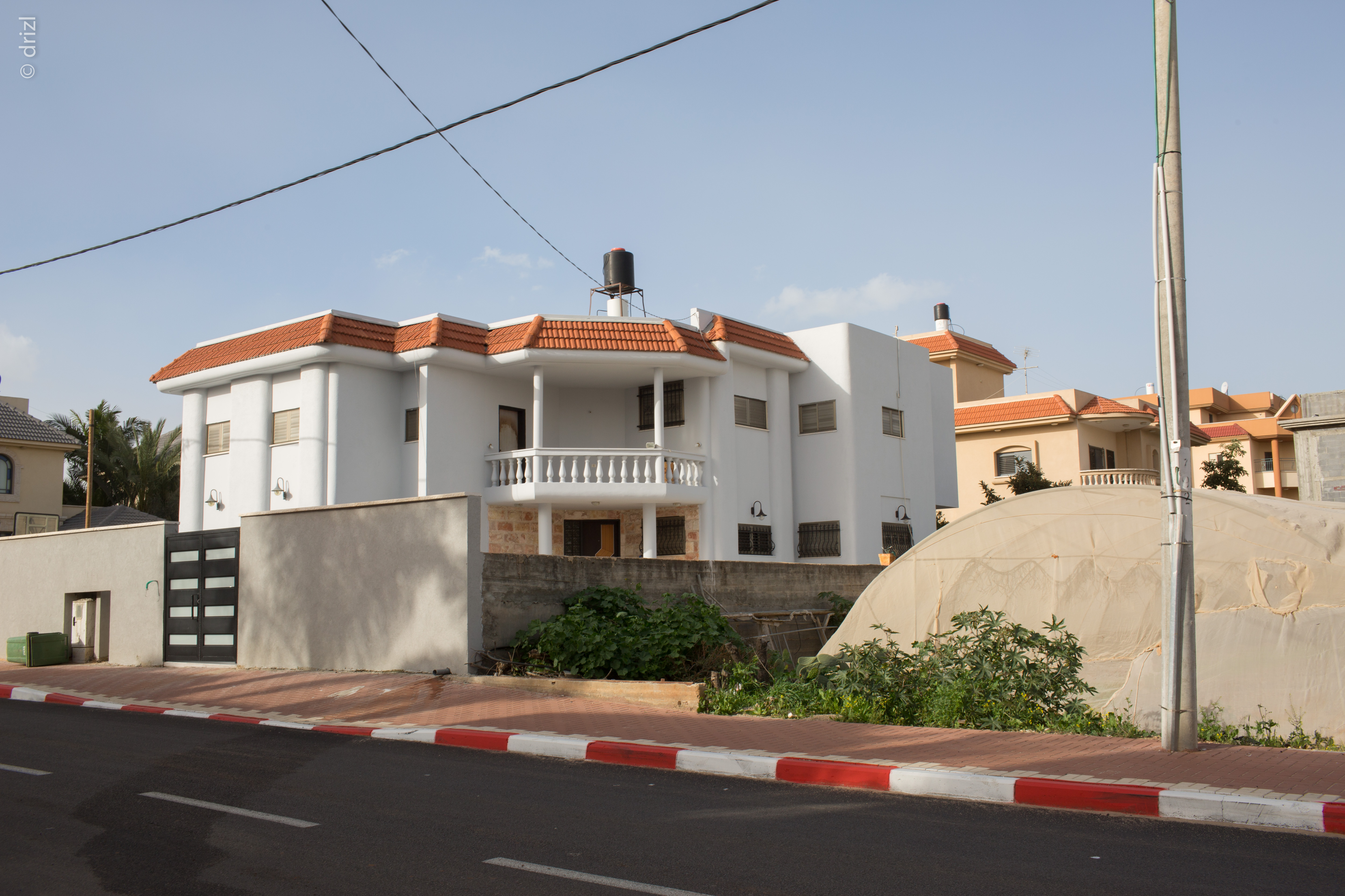 tira-45.jpg Tira Israel